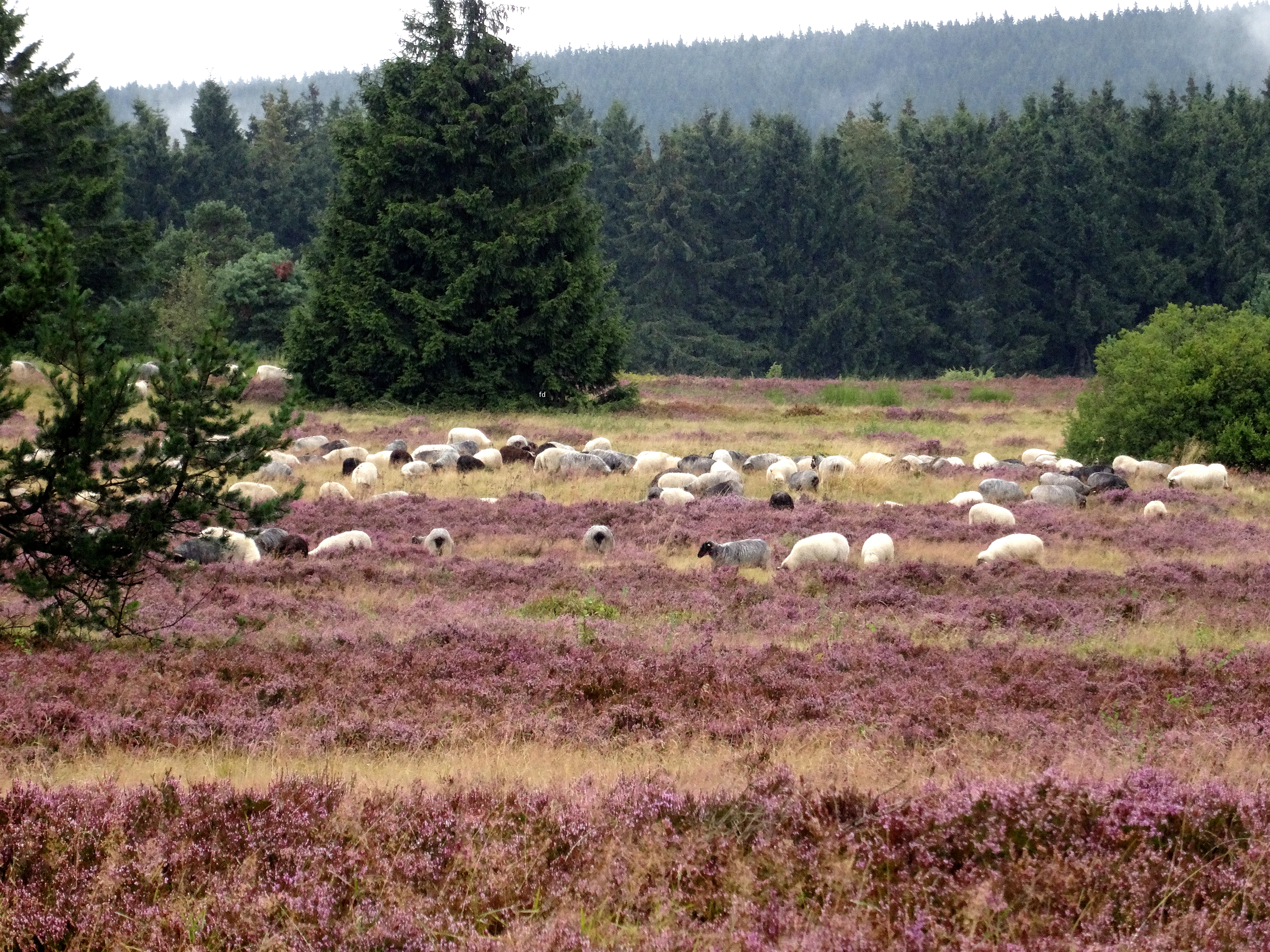 Naturschutzgebiet „Neuer Hagen“ (NSG HSK-006) in Winterberg: Heidelandschaft mit Heidschnucken.